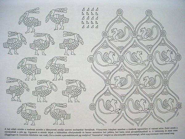 Két mintázat rajza Afrasziabból